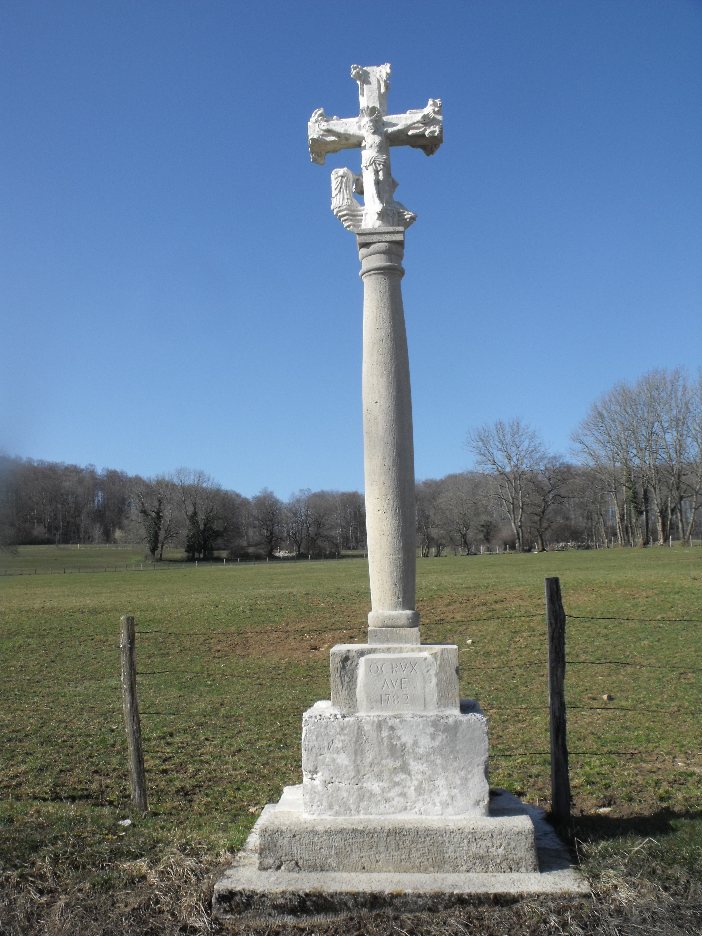 Croix de Domprel, Doubs, France